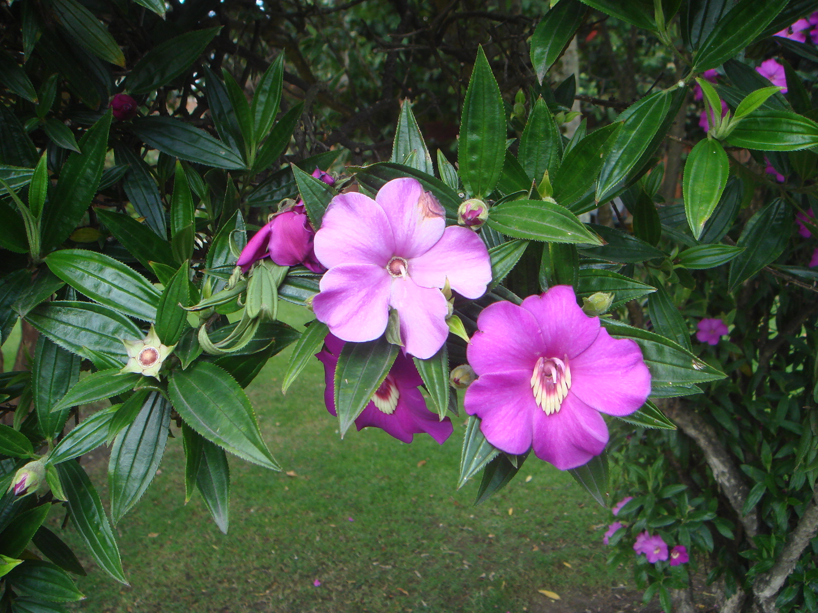 Mayo (Meriania speciosa), Jardín Botánico de Bogotá, Colombia.